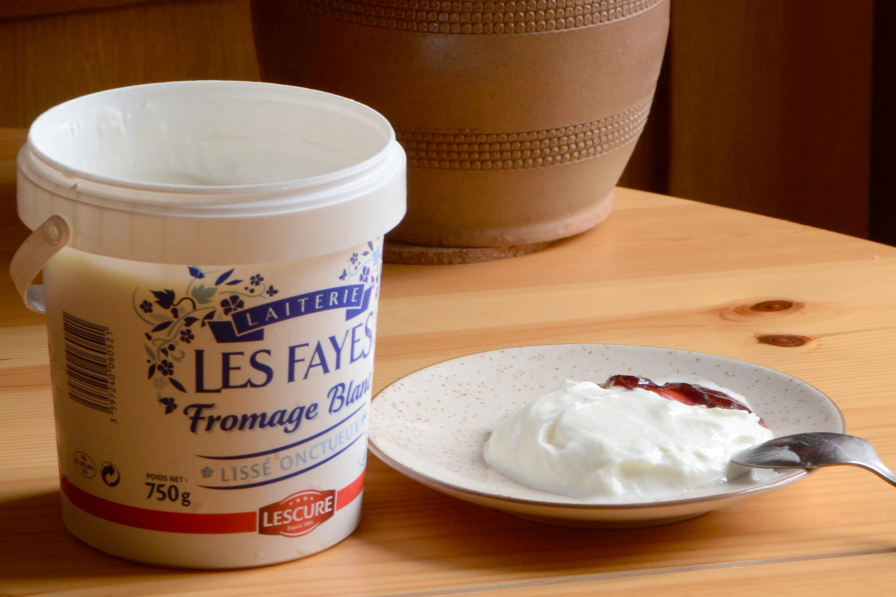 Fromage blanc, France